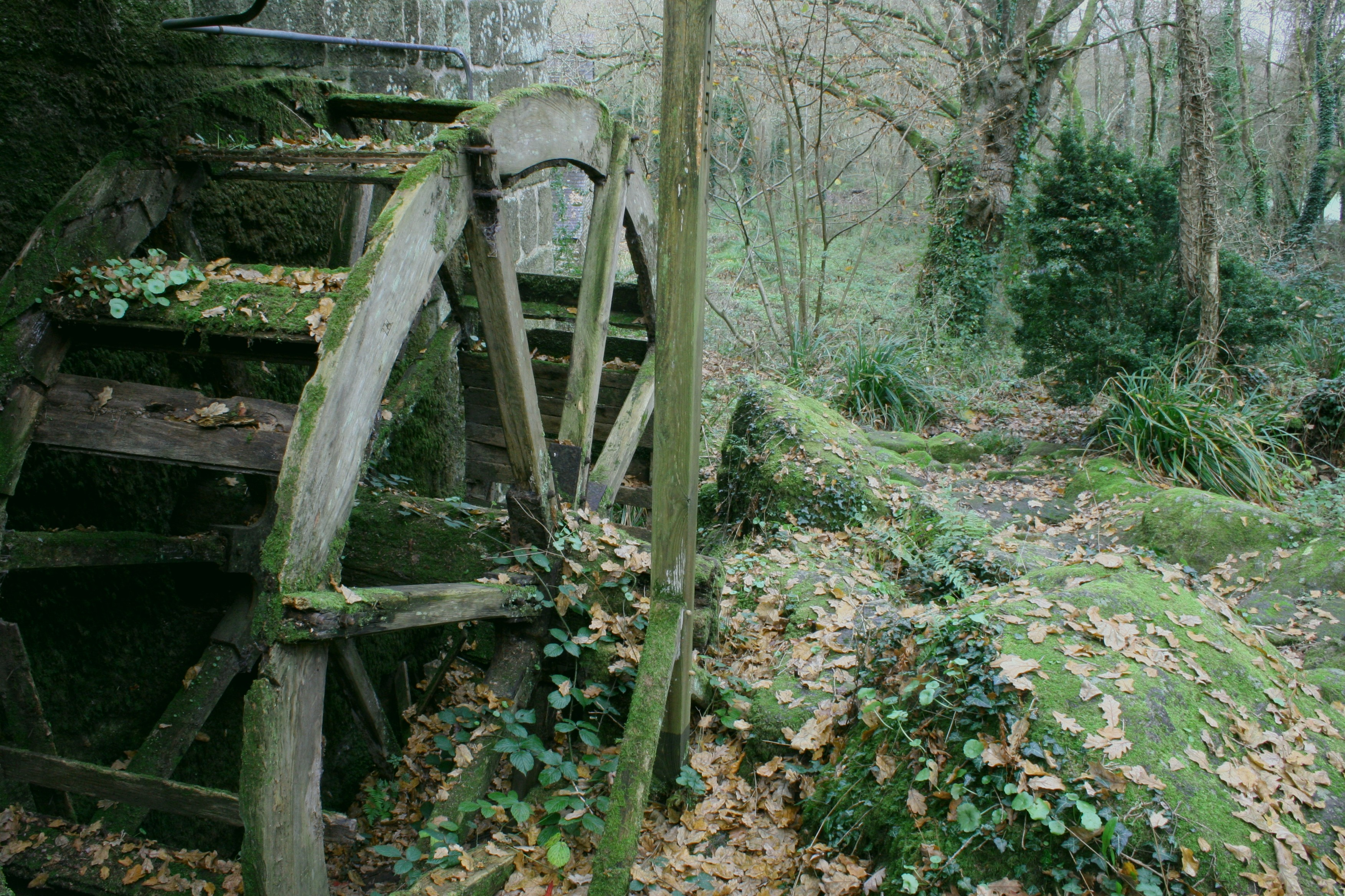 chaos du Moulin de Quip à Allaire - France - Bretagne - Morbihan